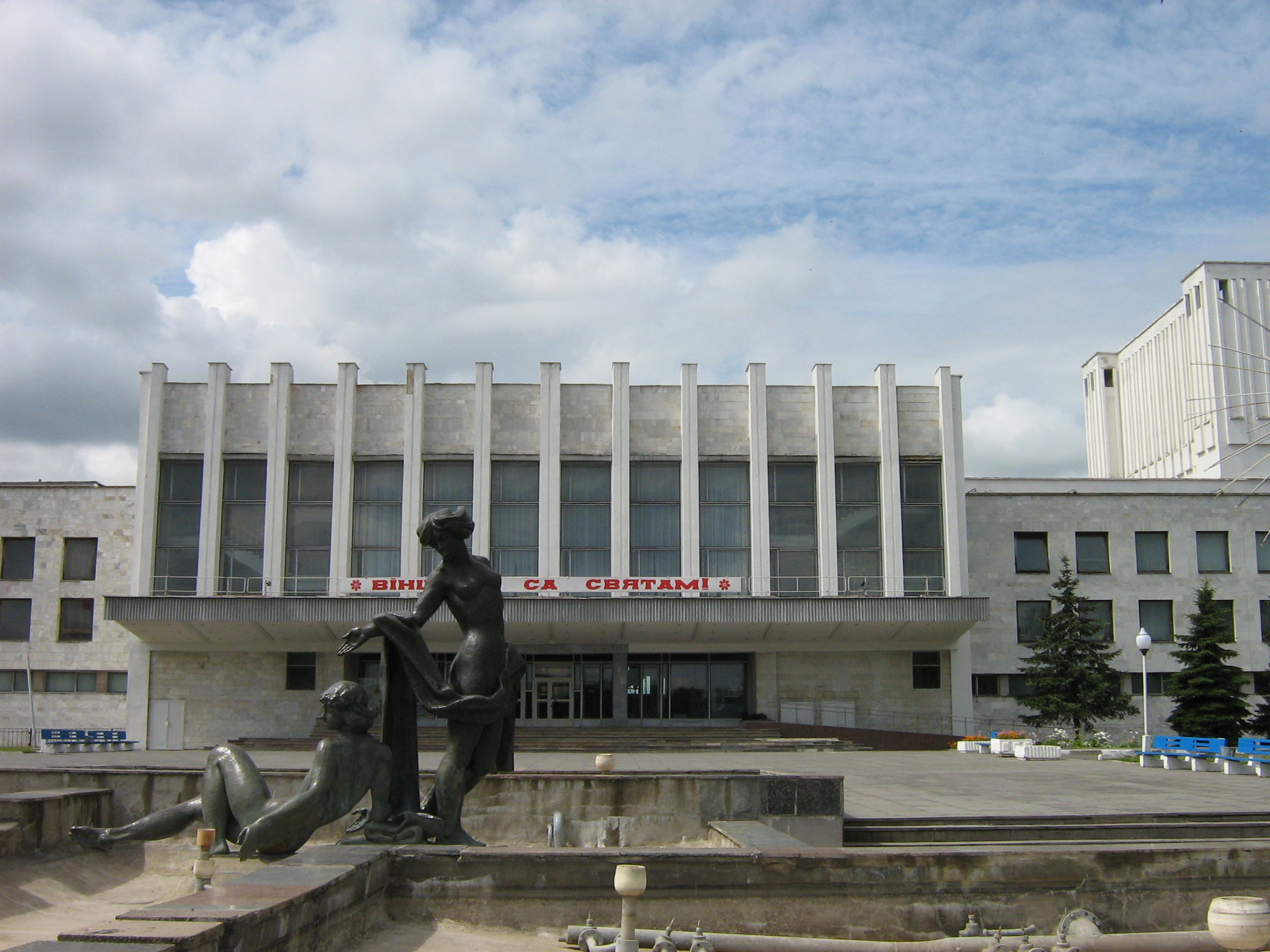 Могилев. Дворец "Химволокно".